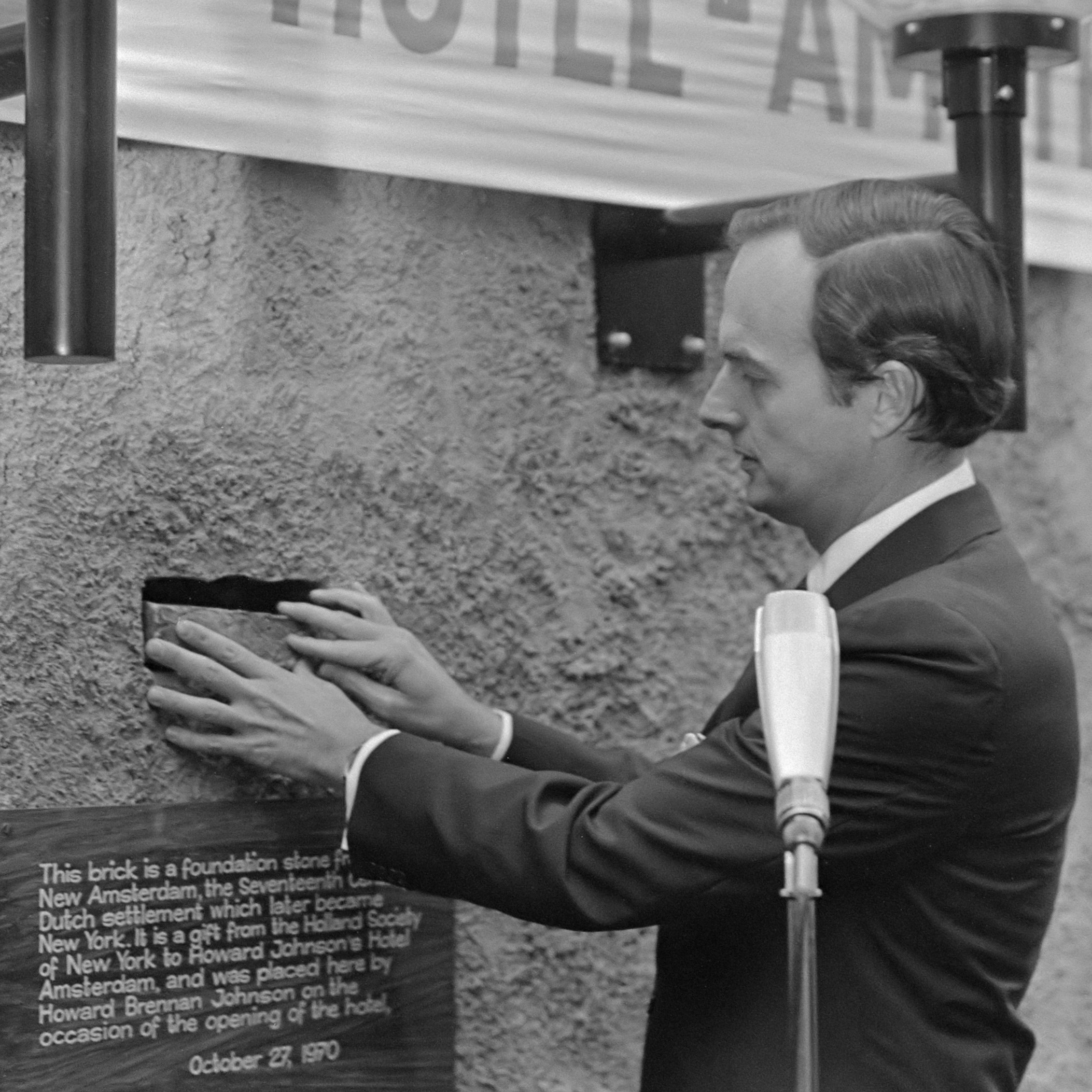 Howard Johnsons Hotel in Amsterdam geopend; Howard Johnson jr. metselt steen in 27 oktober 1970